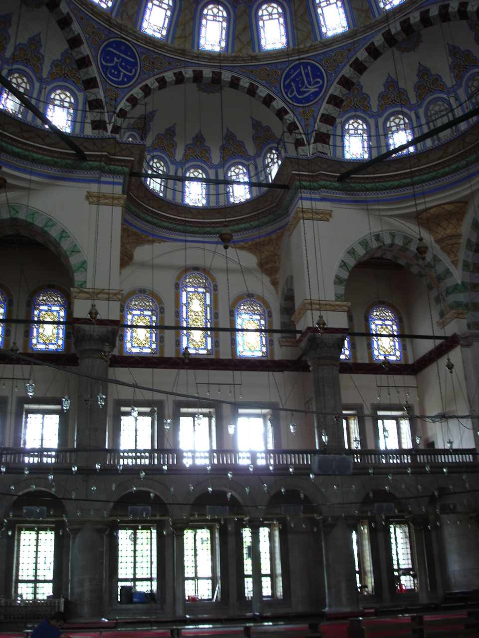 L'interno della moschea detta "Fatih camii" ("la moschea del Conquistatore") o "Fatih Memhet camii" ("la moschea di Maometto il Conquistatore"), ad Istanbul. Foto di: Giovanni Dall'Orto, 26-5-2006.